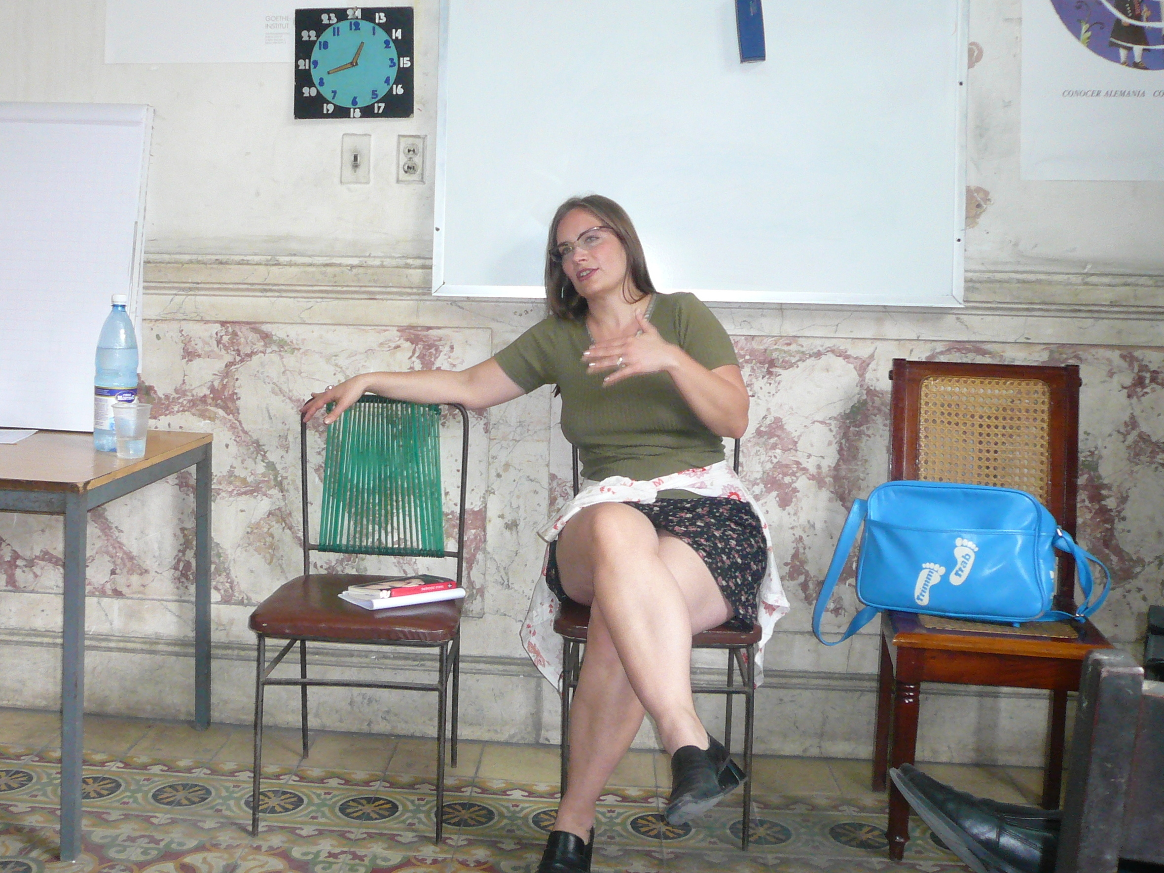 Tanja Dückers während einer Dichterlesung zur Buchmesse 2008 in Havanna, Kuba